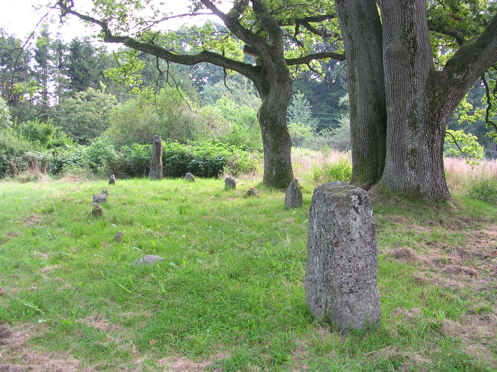 Steinsetting Agnes i Stavern - Larvik. Hagbard og Signe